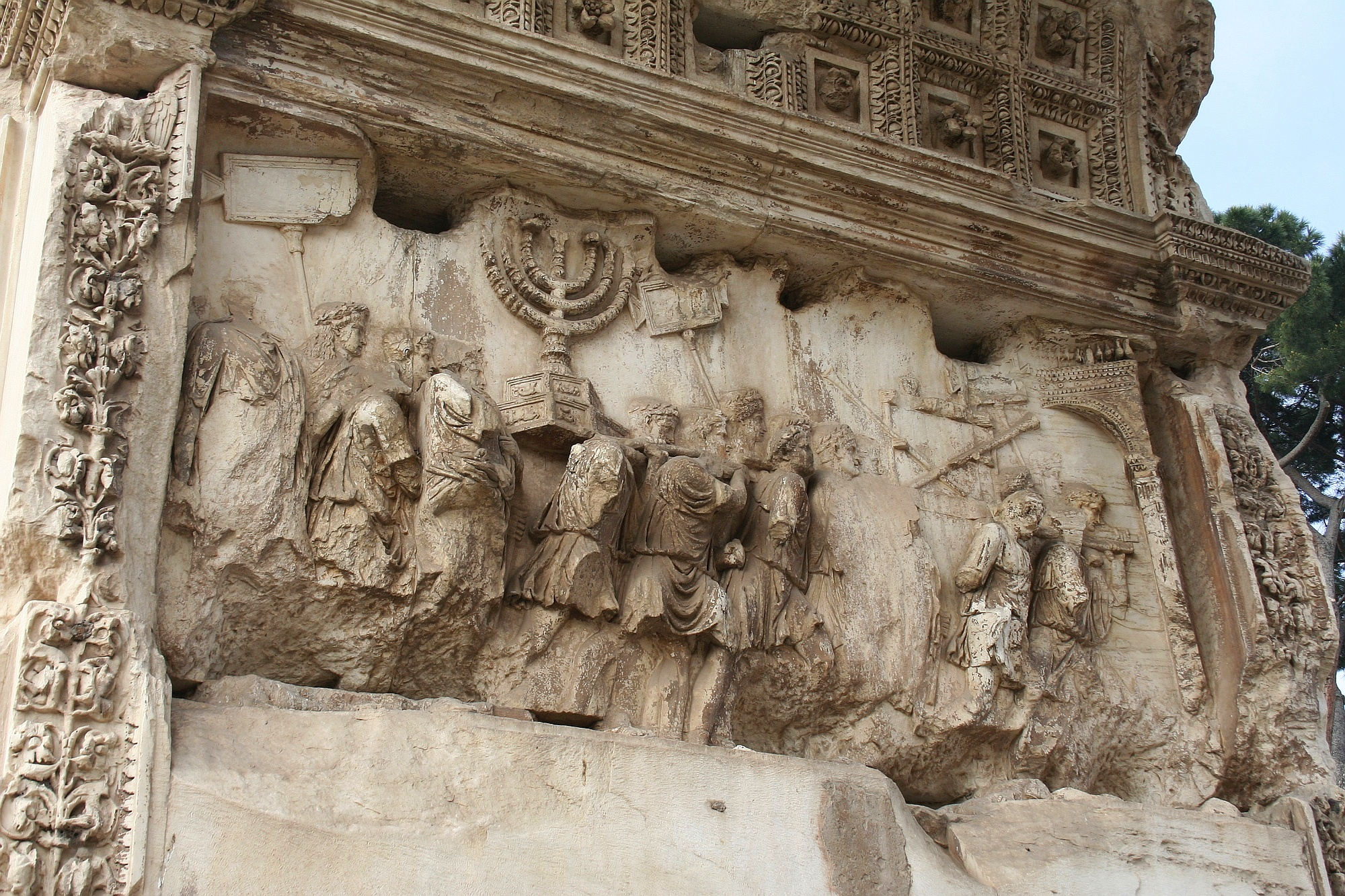 Relief du pillage du trésor du temple Jérusalem, pilier sud.